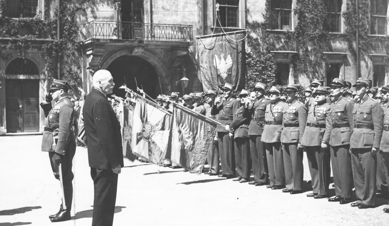 Prezydent RP Ignacy Mościcki wygłasza przemówienie do uczestników zjazdu członków Związku Byłych Ochotników Armii Polskiej w Warszawie na dziedzińcu Zamku Królewskiego.